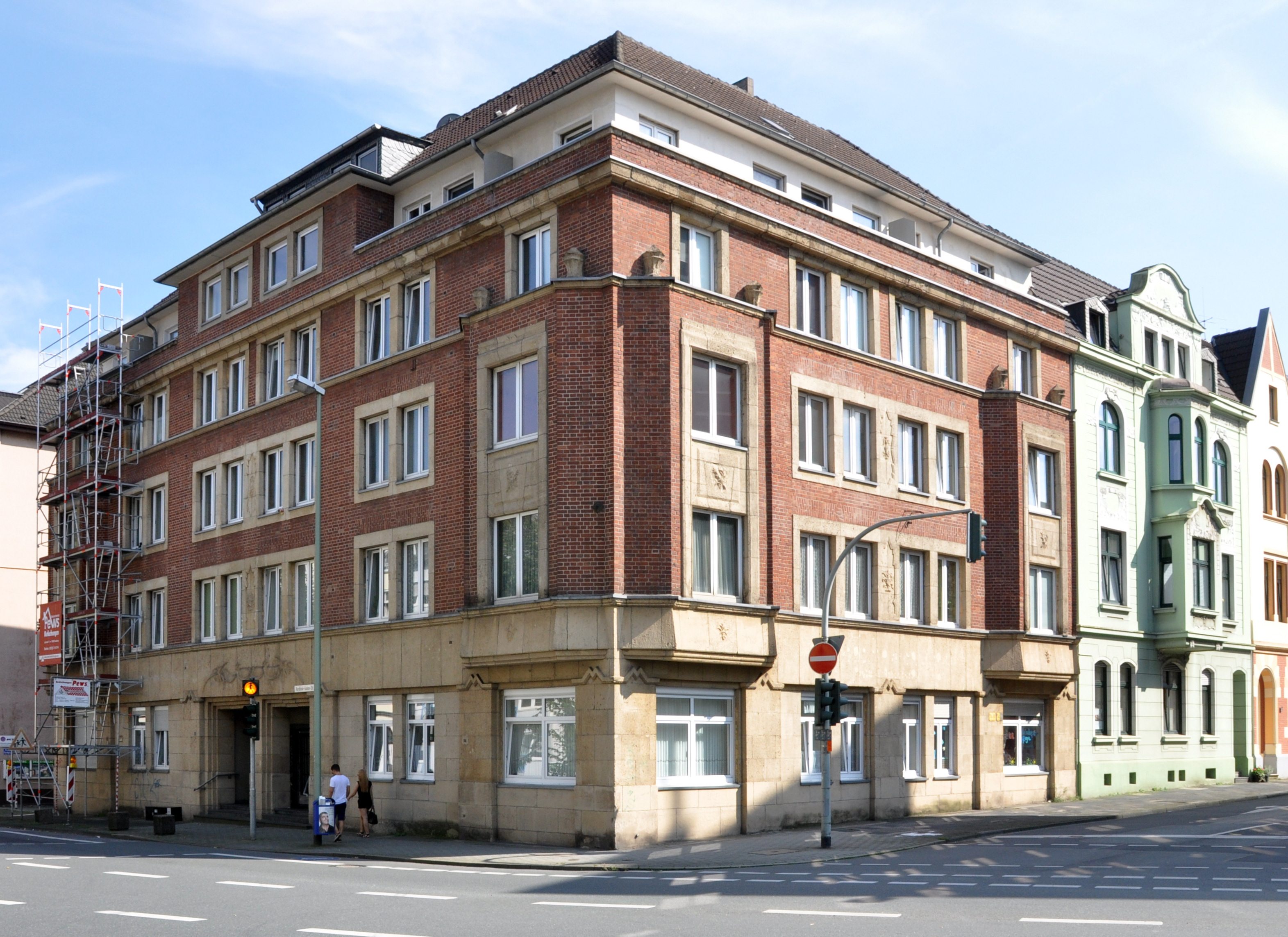 Gebäudekomplex mit Backsteinfassade von Gustav von Cube und Arthur Buchloh von 1921This is a photograph of an architectural monument., no. 508